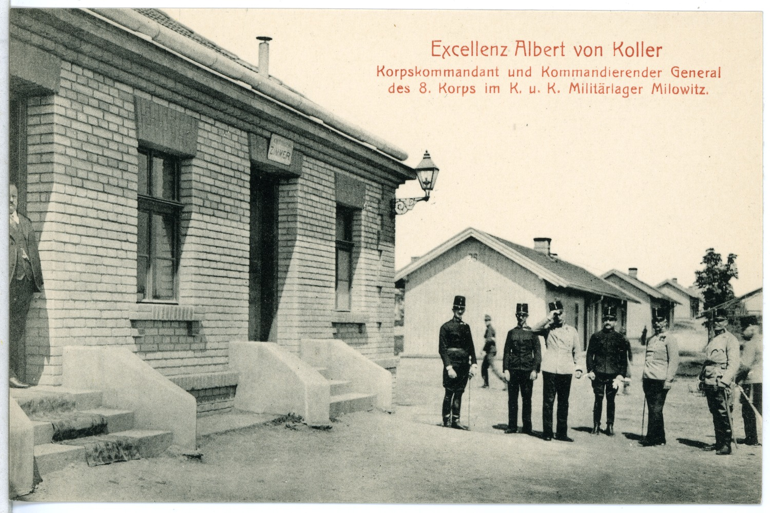 Milowitz; Militärlager - Albert von Koller Kommandant This postcard is from publisher Brück & Sohn in Meißen ( postcard has a unique number 12338 and is available in a higher resolution at the publisher. This images was uploaded in a cooperation project between Wikipedians and the publisher.